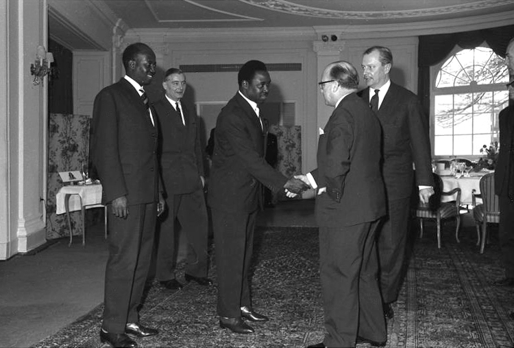 Essen für Min. Beavogui und Staatssekr. Diop von Guinea